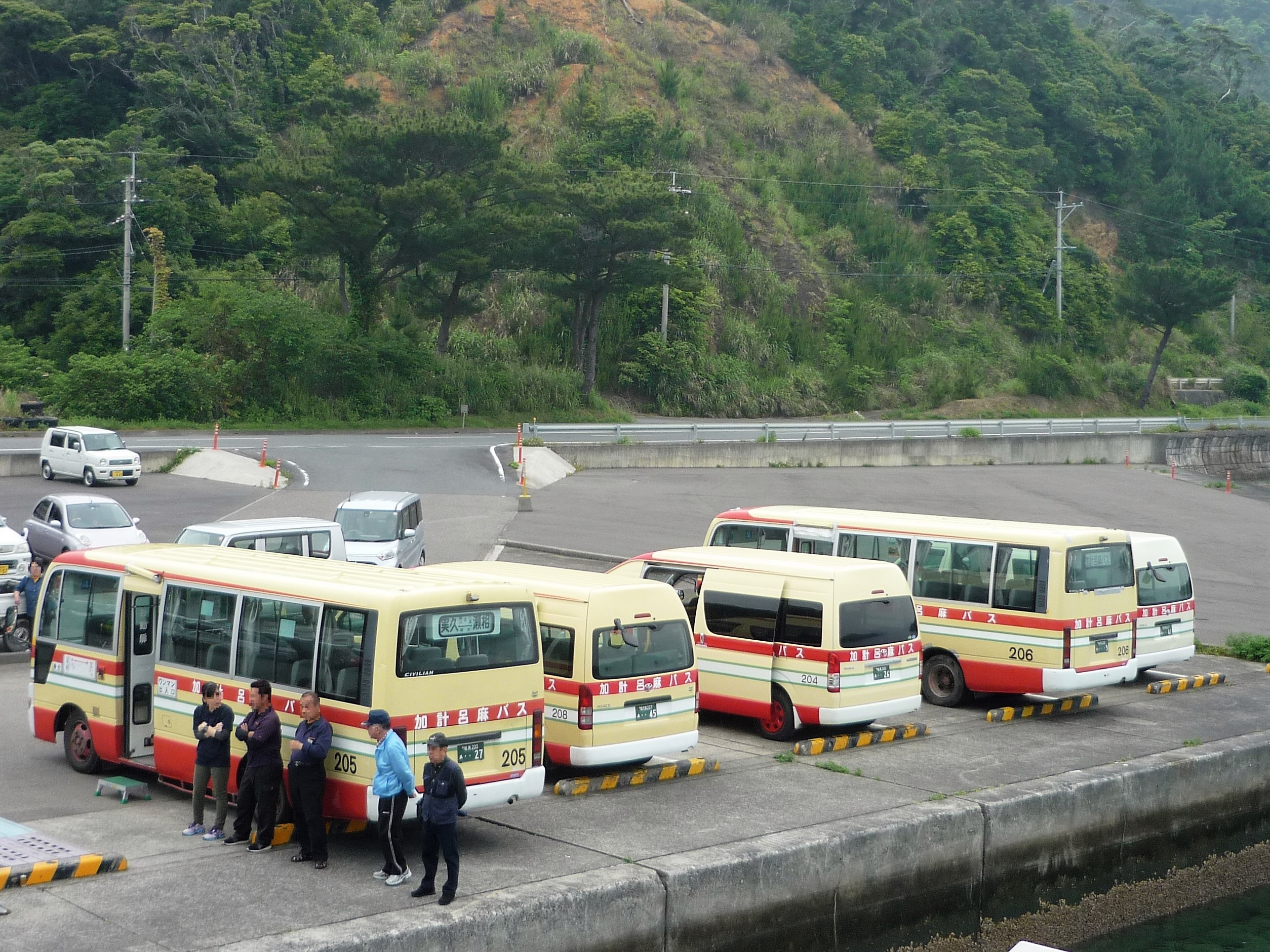 古仁屋からのフェリーに接続するため瀬相港に待機する加計呂麻バス